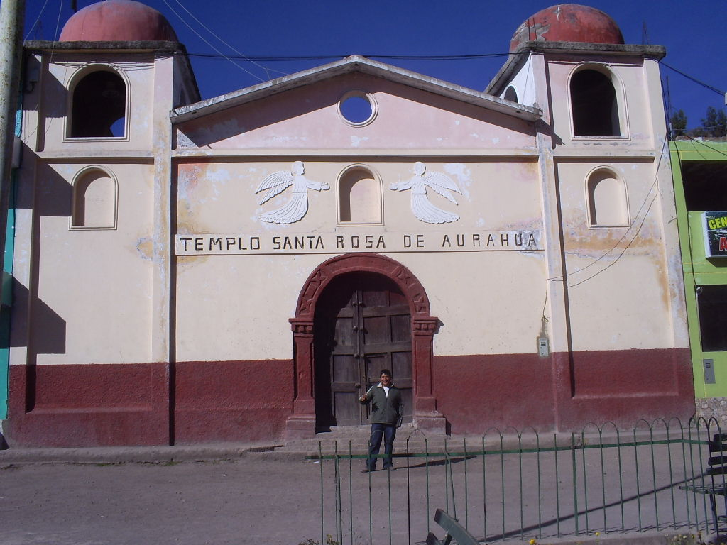 Templo Santa Rosa de Aurahua